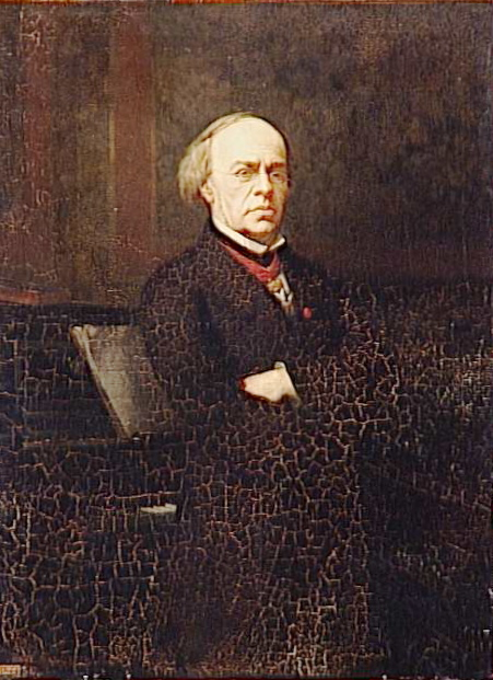 Portrait de Jacques-Fromental Halévy, compositeur (1799-1862)